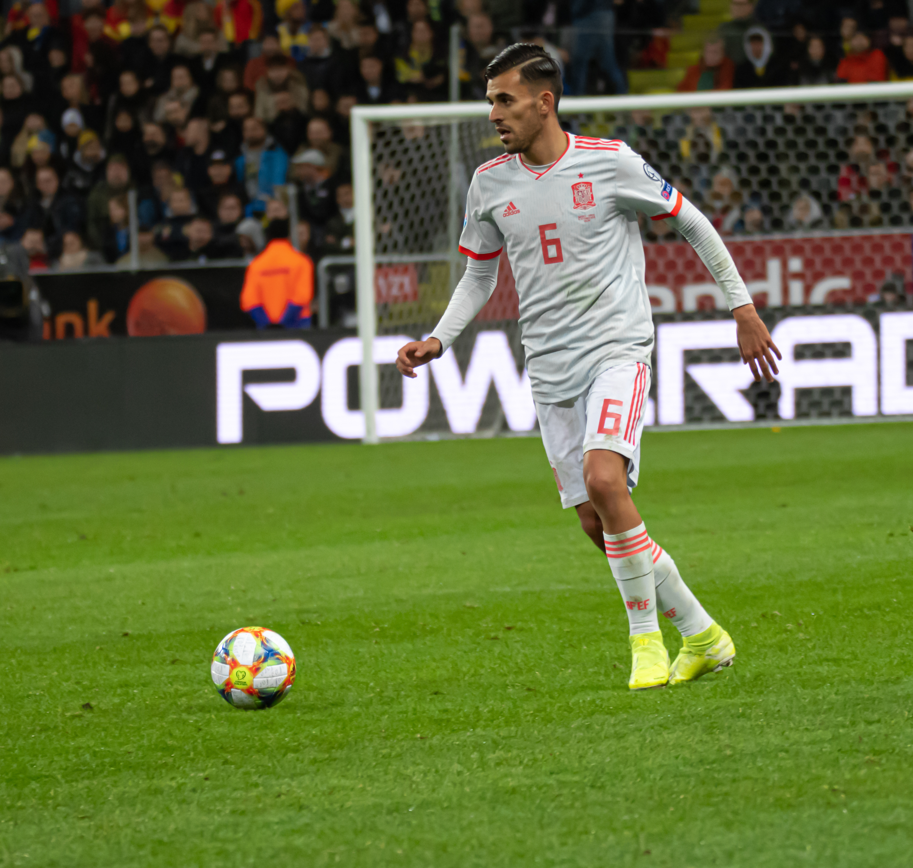 UEFA EURO qualifiers Sweden vs Spain 20191015